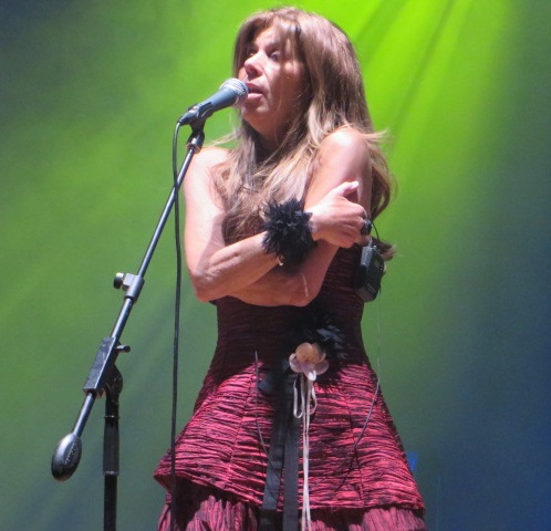 cantante Jeanette en un concierto (Arequipa 2014).